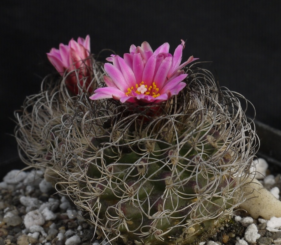 Turbinicarpus pseudomacrochele ssp. lausseri, Typstandort in Blüte.